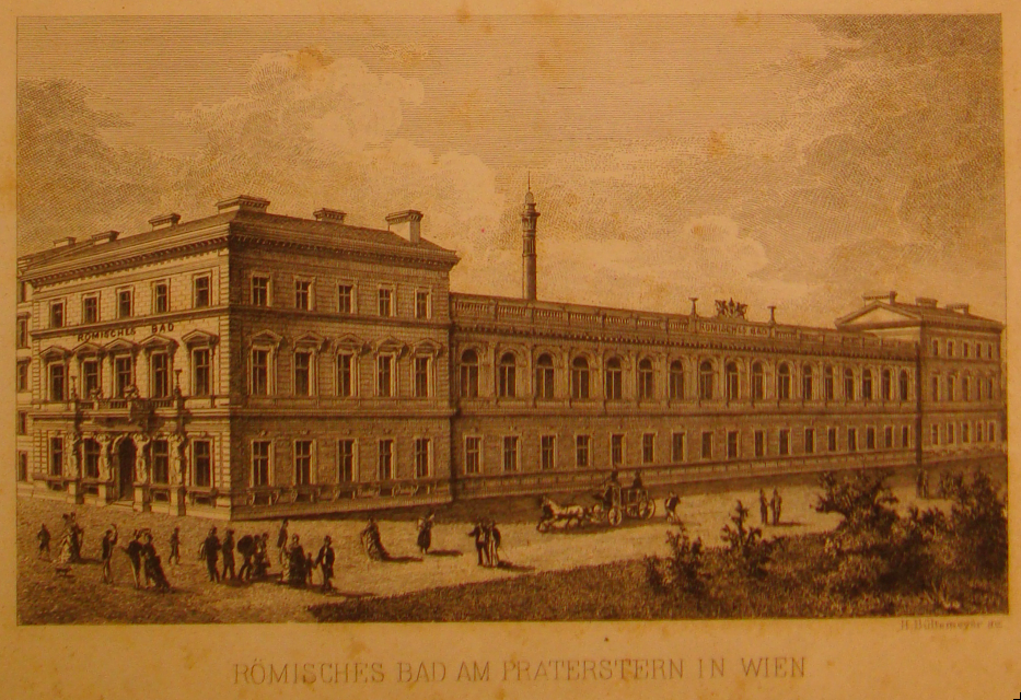 Roemerbad-Wien 1873